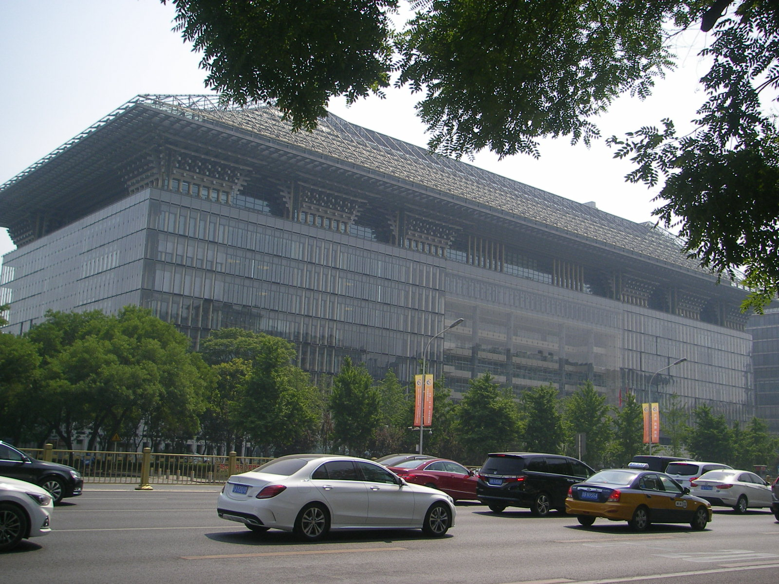 国家開発銀行（北京）201705